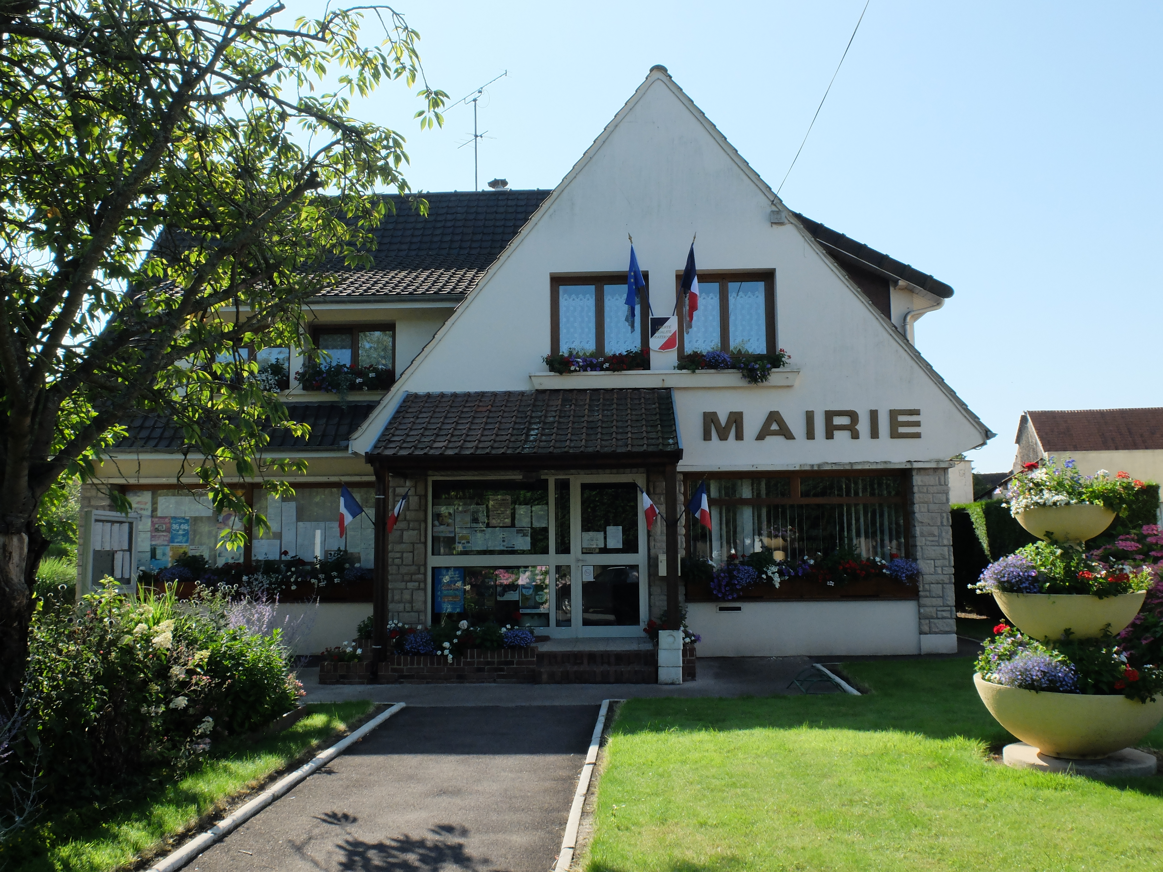 Vue de la mairie de Maresquel-Ecquemicourt.